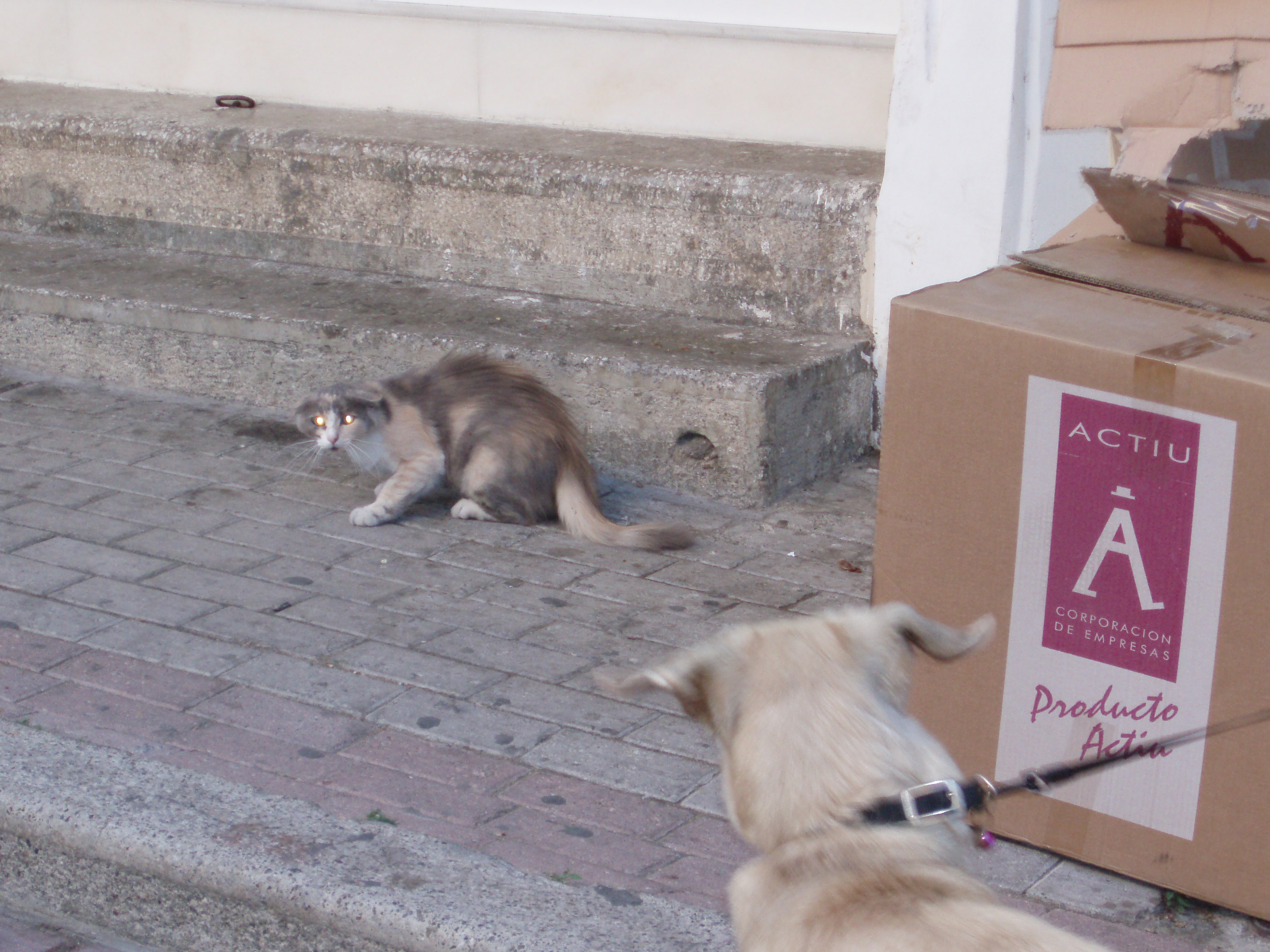 Arme Katze